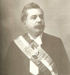 Fotografía del expresidente dominicano Juan Isidro Jimenes